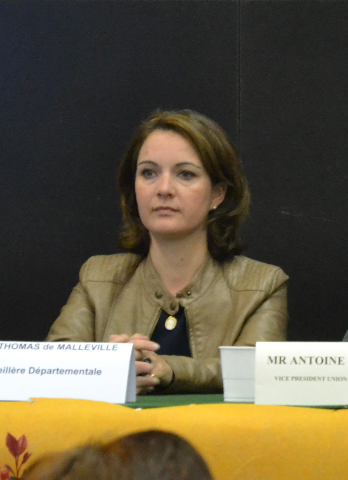 Marie Thomas de Maleville, conseillère départementale de Vaucluse, pour le canton de Carpentras, lors du 48 ème congrès départementale des donneurs de sang bénévoles de Vaucluse